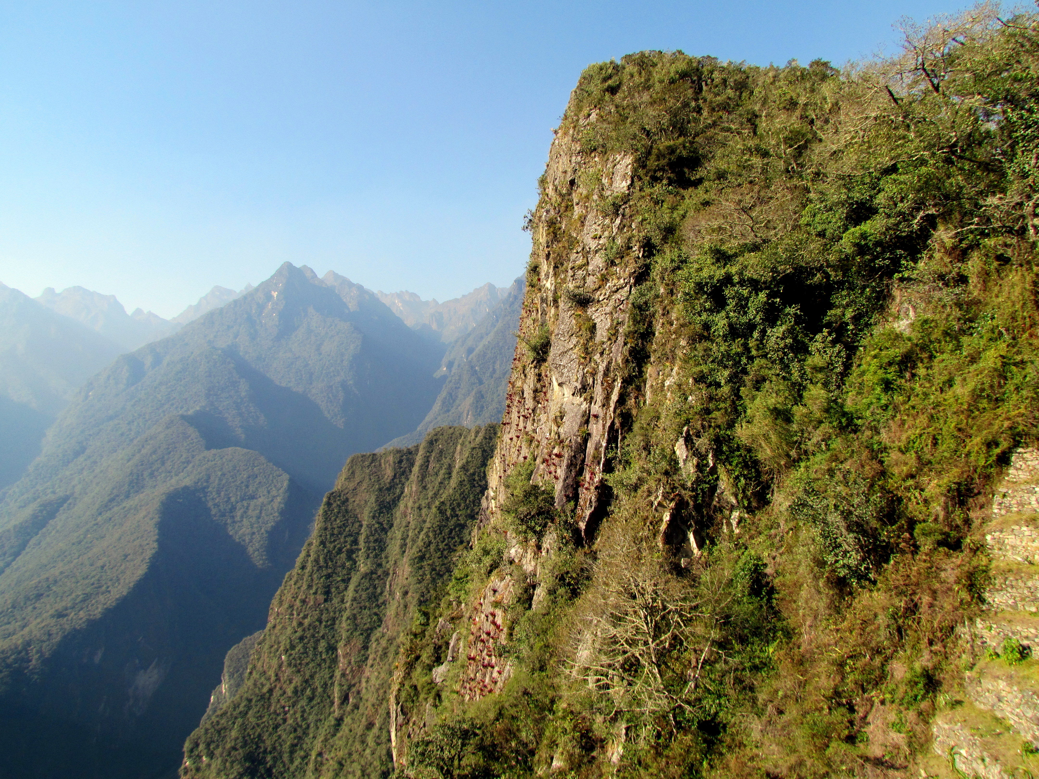 205 View from Sun Gate Machu Picchu Peru 2471